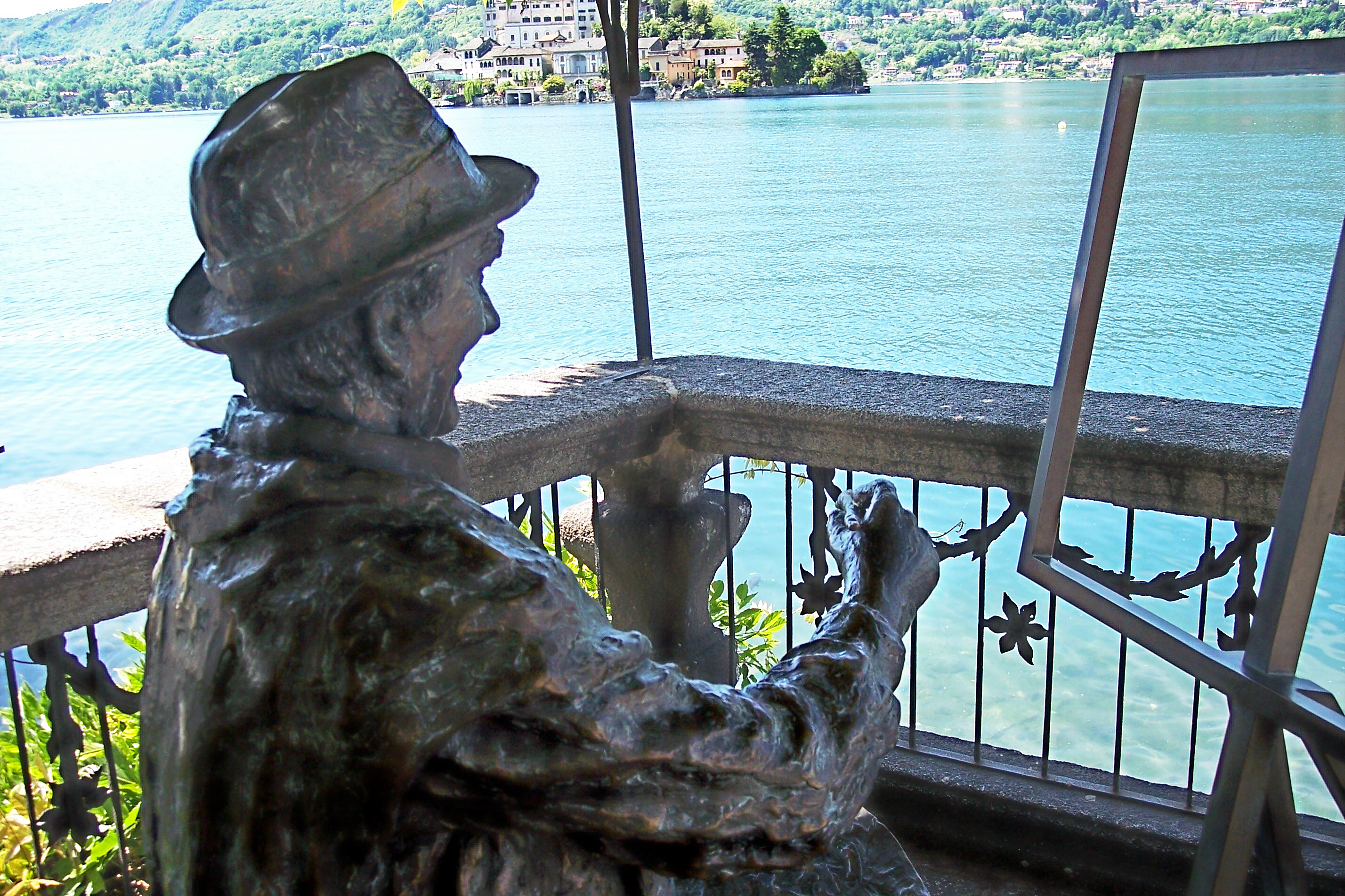 Denkmal für den Filmschauspieler Karl-Heinz Schroth als Maler am Lago d'Orta in Oberitalien